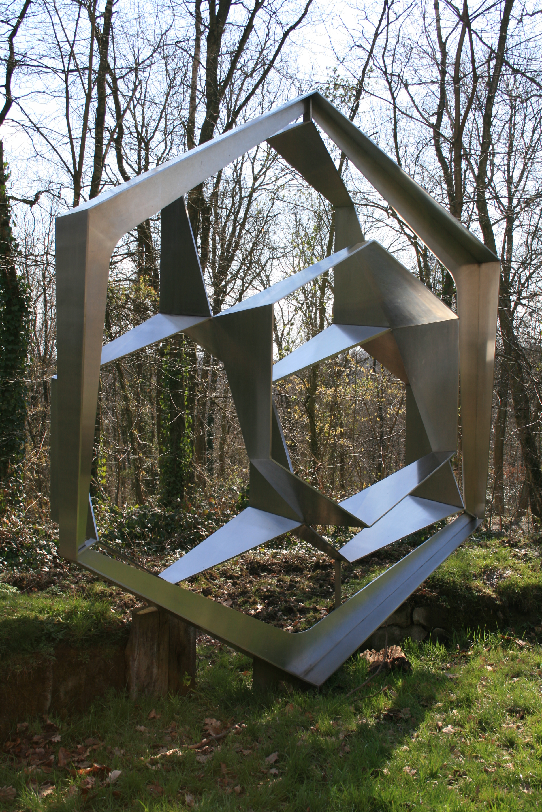 "Hommage à Maeterlinck (le nid d'abeilles)" (1969, inoxidizable steel) by J.P. Laenen - Musée en plein air du Sart Tilman